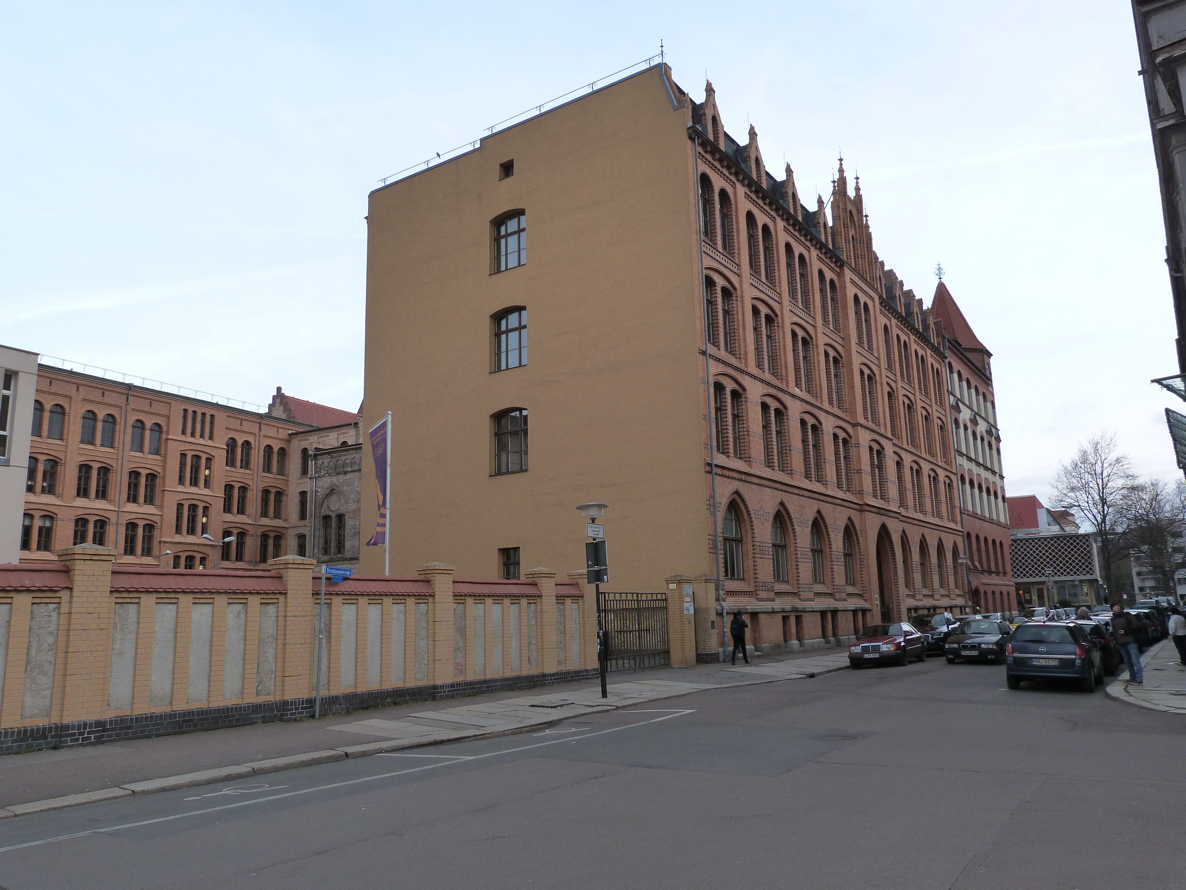 Dreyhauptstraße mit Neuem Städtischen Gymnasium (Dreyhauptschule), Halle (Saale)